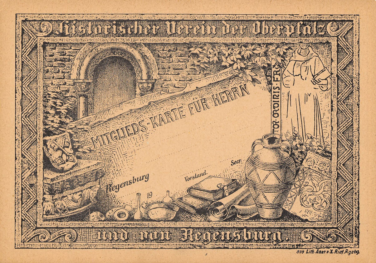 Litho - Mitgliedskarte des Historischen Vereins der Oberpfalz und von Regensburg